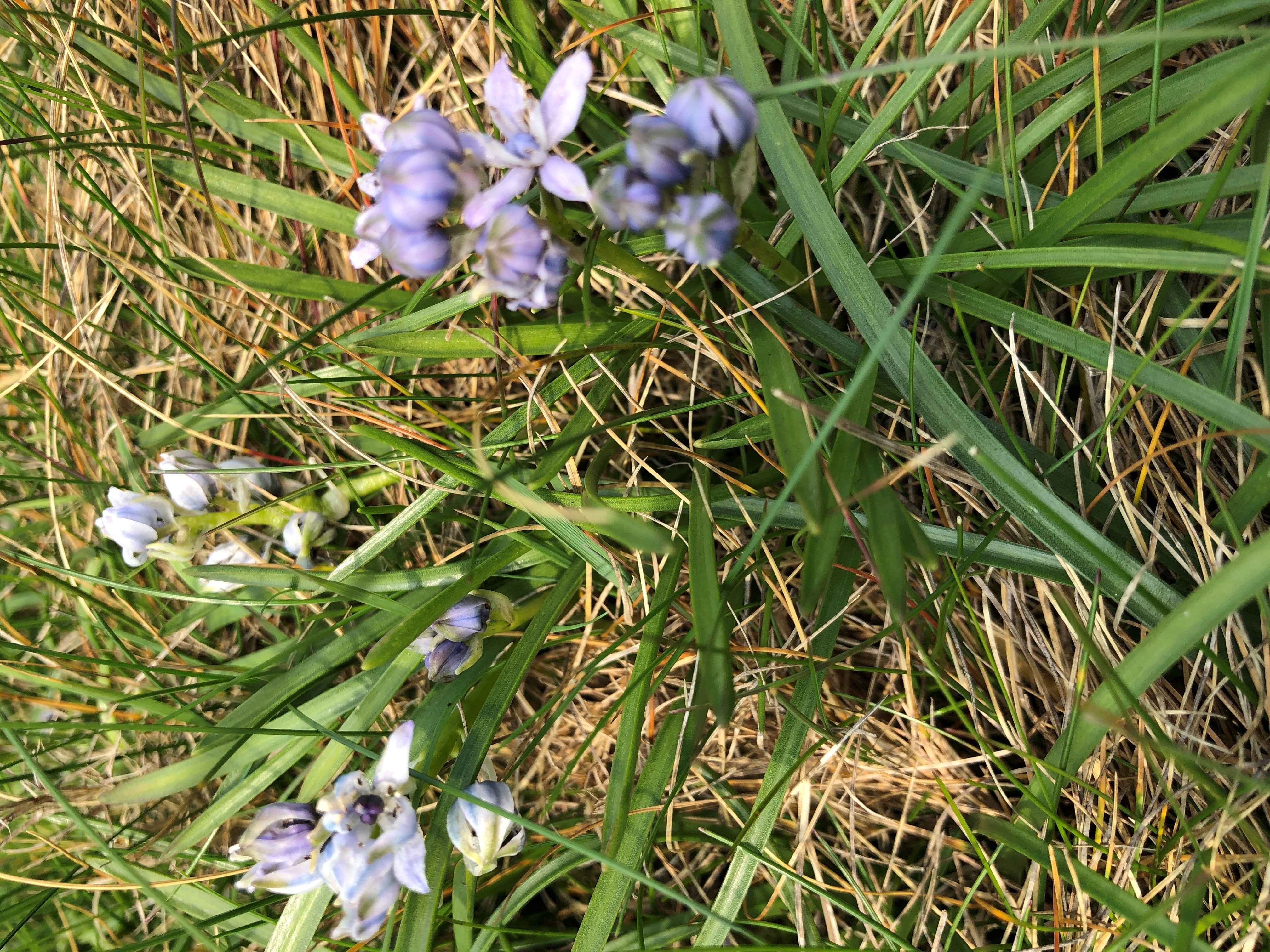 Serennyn y gwanwyn, Porth Ychain.